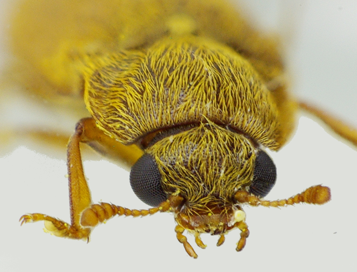 Byturus ochraceus Süddeutschland, Baden-Württemberg zwischen Tuttlingen und Rottweil, 700m, Vorderseite